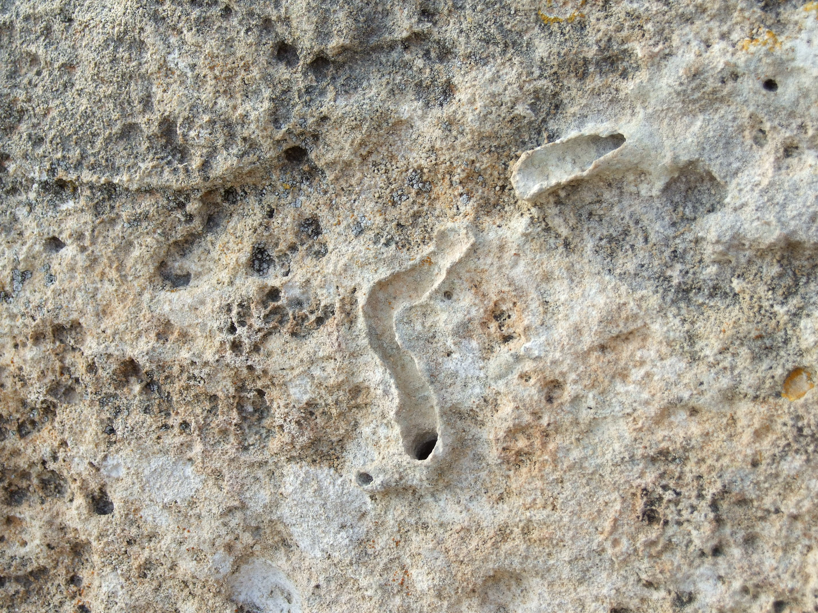 Bioturbation im Kalkarenit Marès. Fundort: Halbinsel Punta de n’Amer, Mallorca